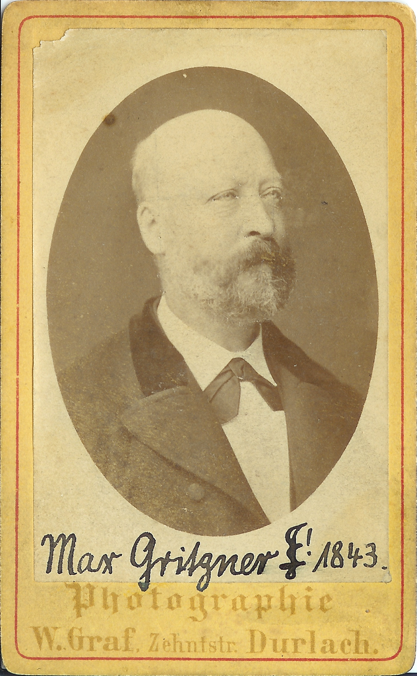 Auf dem Bild ist Max Carl Gritzner abgebildet. Obwohl das genaue Datum der Aufnahme nicht vorliegt, ist das Bild mit Sicherheit älter als 100 Jahre, da Gritzner 1892 verstorben ist. Das Bild stammt aus dem Archiv der Karlsruher Burschenschaft Teutonia.